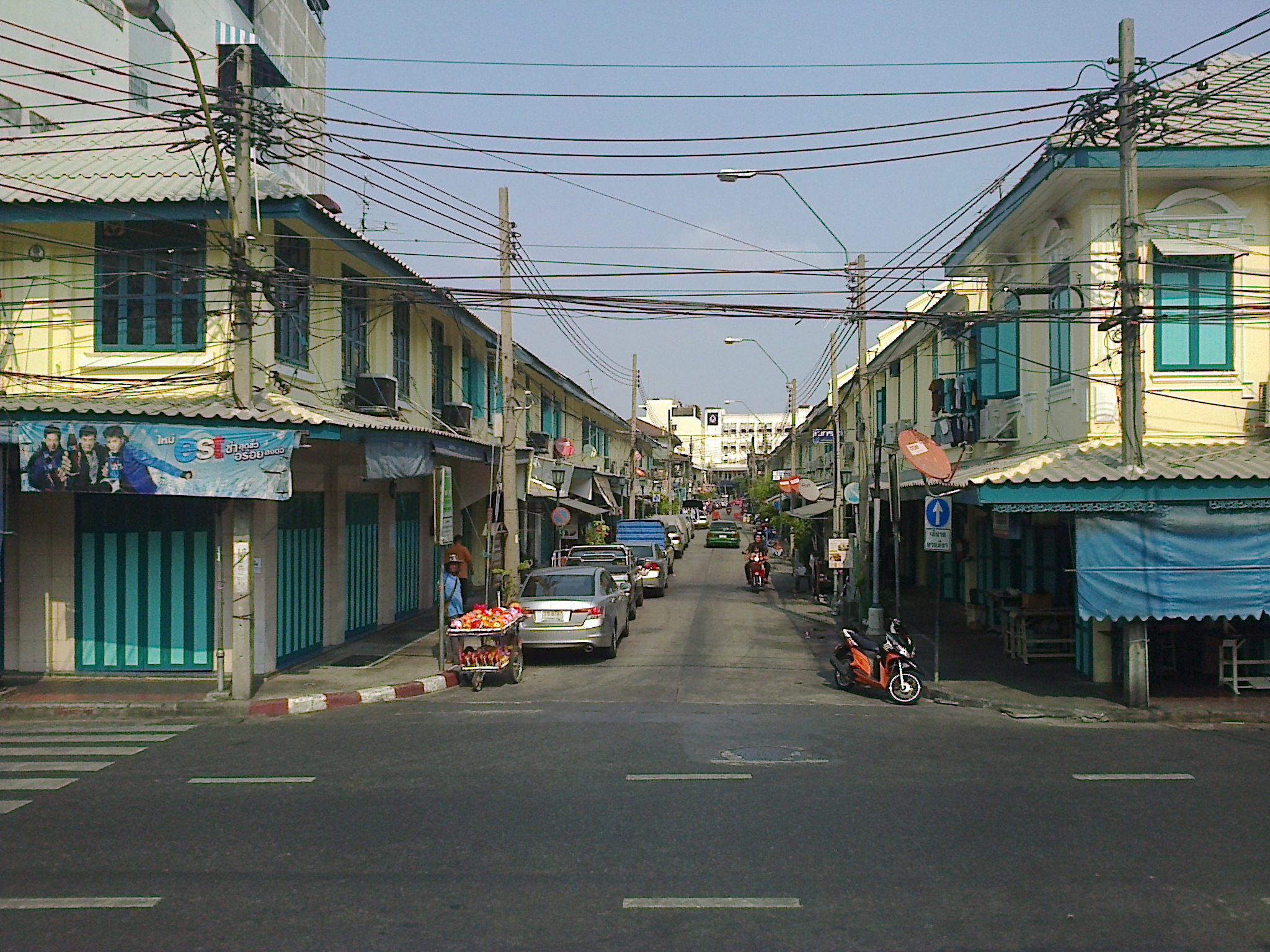 PHRAENG NARA